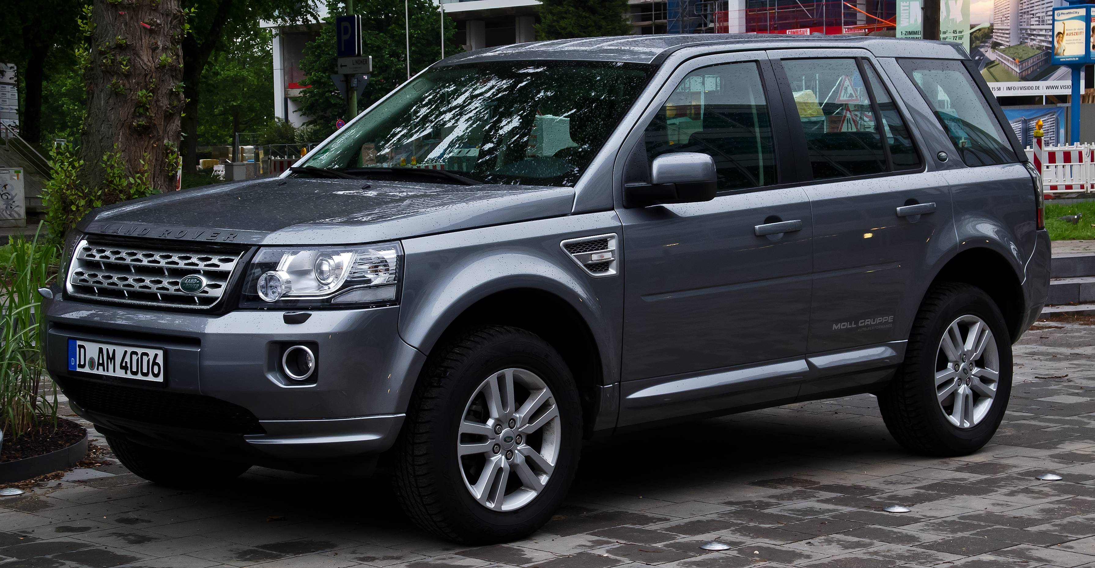 Land Rover Freelander SD4 SE (II, 2. Facelift)